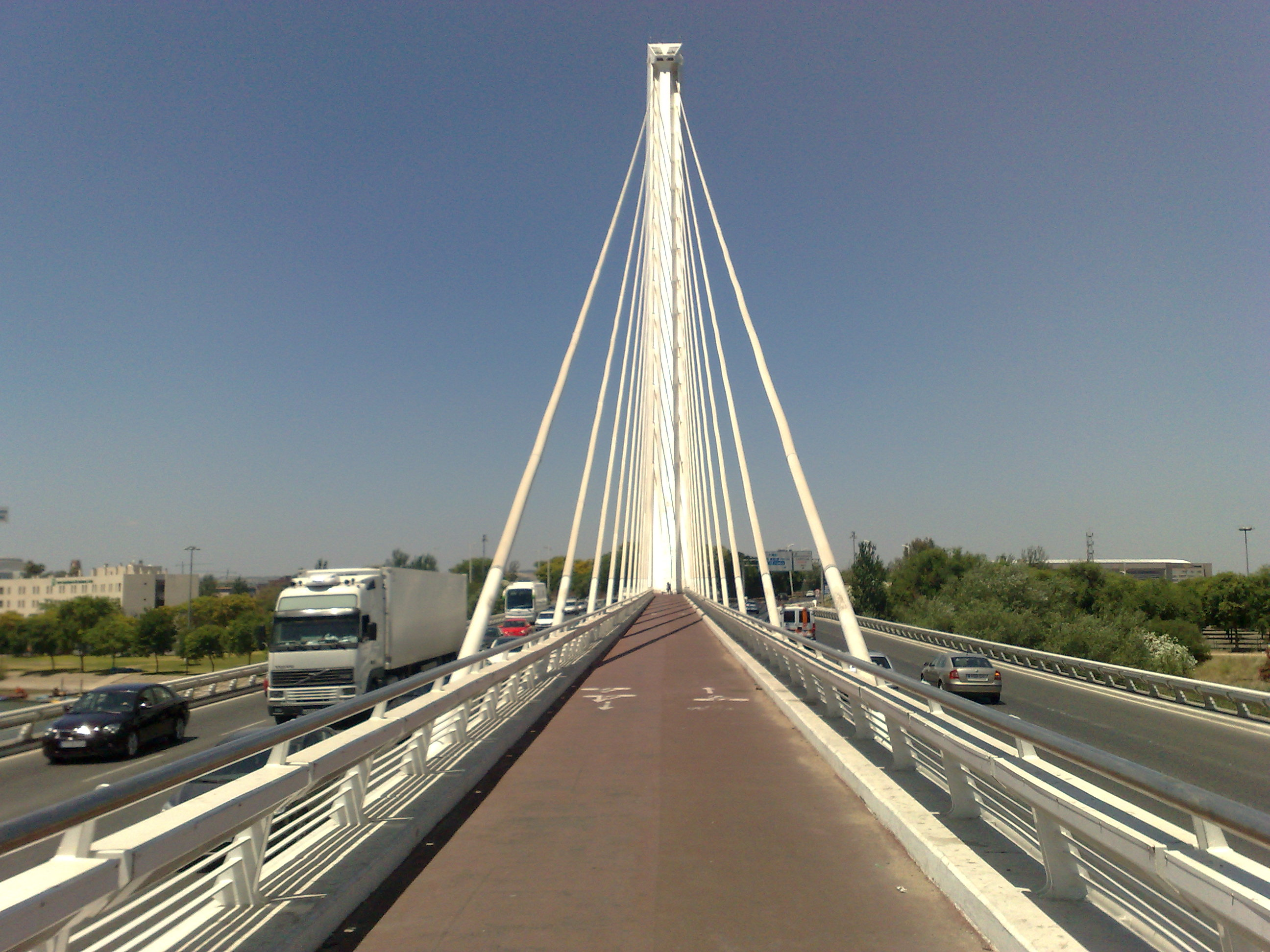 Seville, Sevilla, Spain